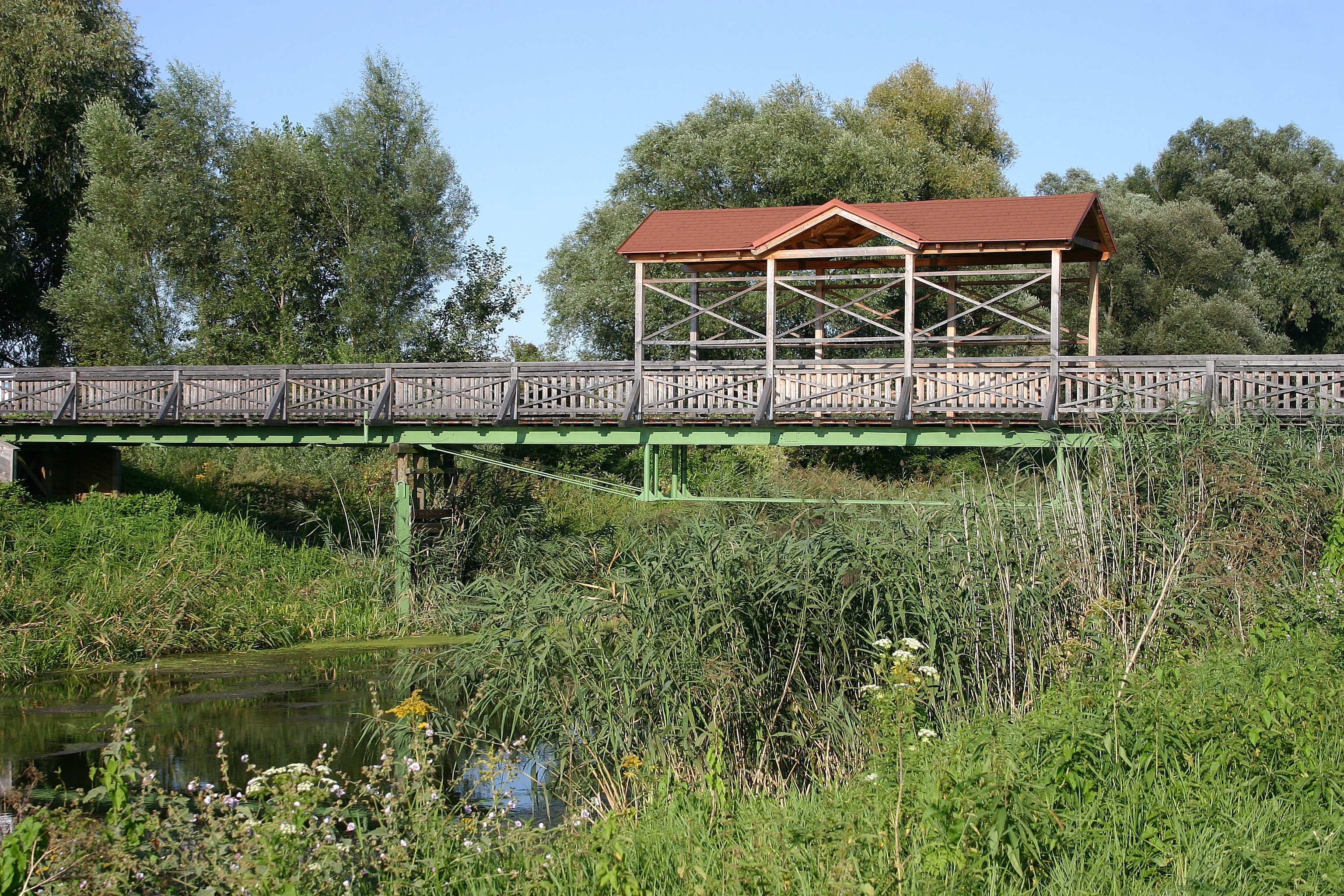 Andau – die Brücke von Andau über den Einser-Kanal, Originalschauplatz für den Film Der Bockerer III